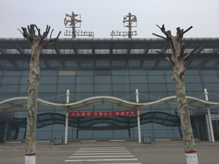 济宁曲阜机场航站楼